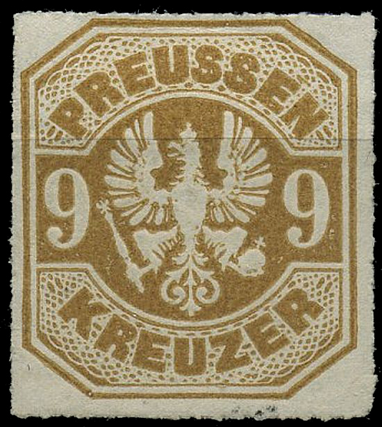 Последняя почтовая марка Пруссии, 1867